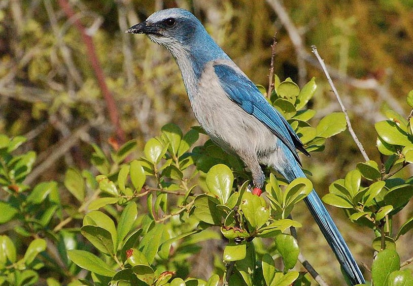 Florida Scrub-Jay (Aphelocoma coerulescens)